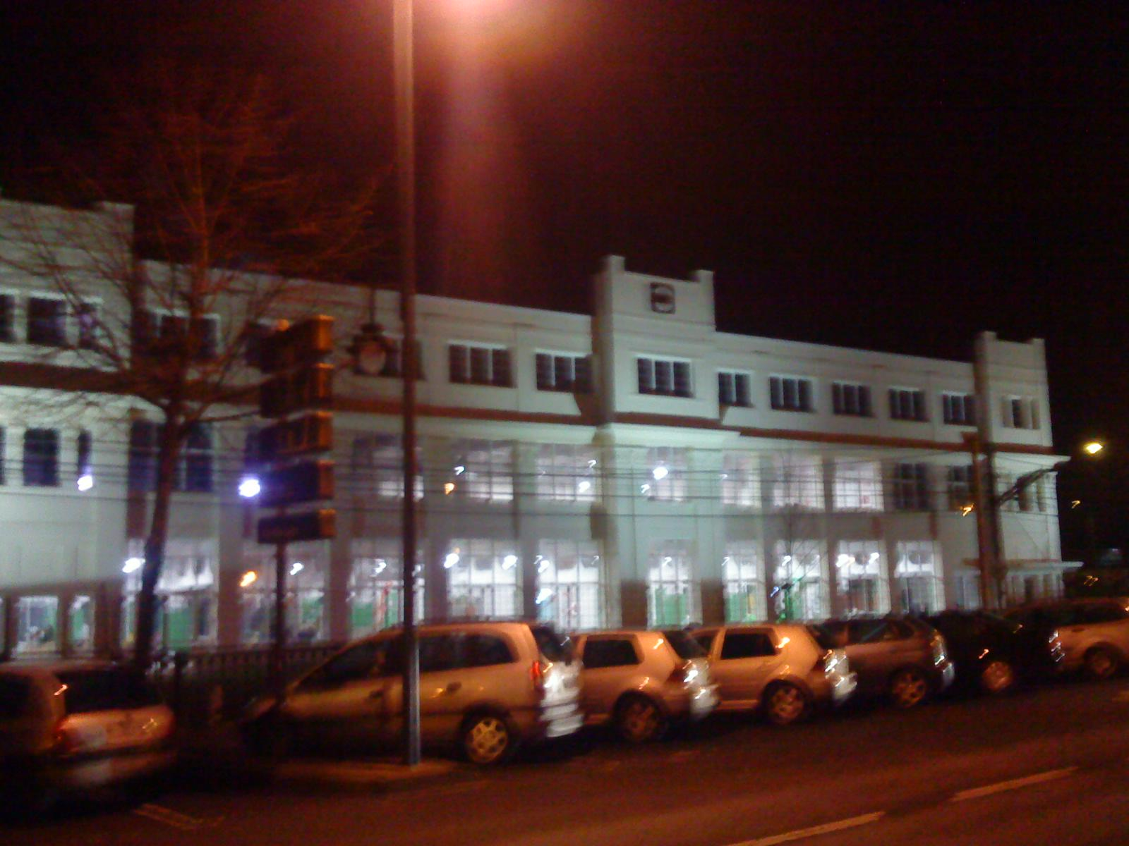 Gernika, edificio ASTRA 2012 facha principal del antiguo edificio industrial.